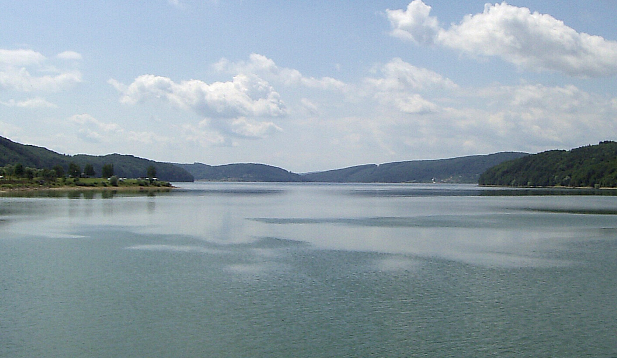 vodná nádrž Velká Domaša